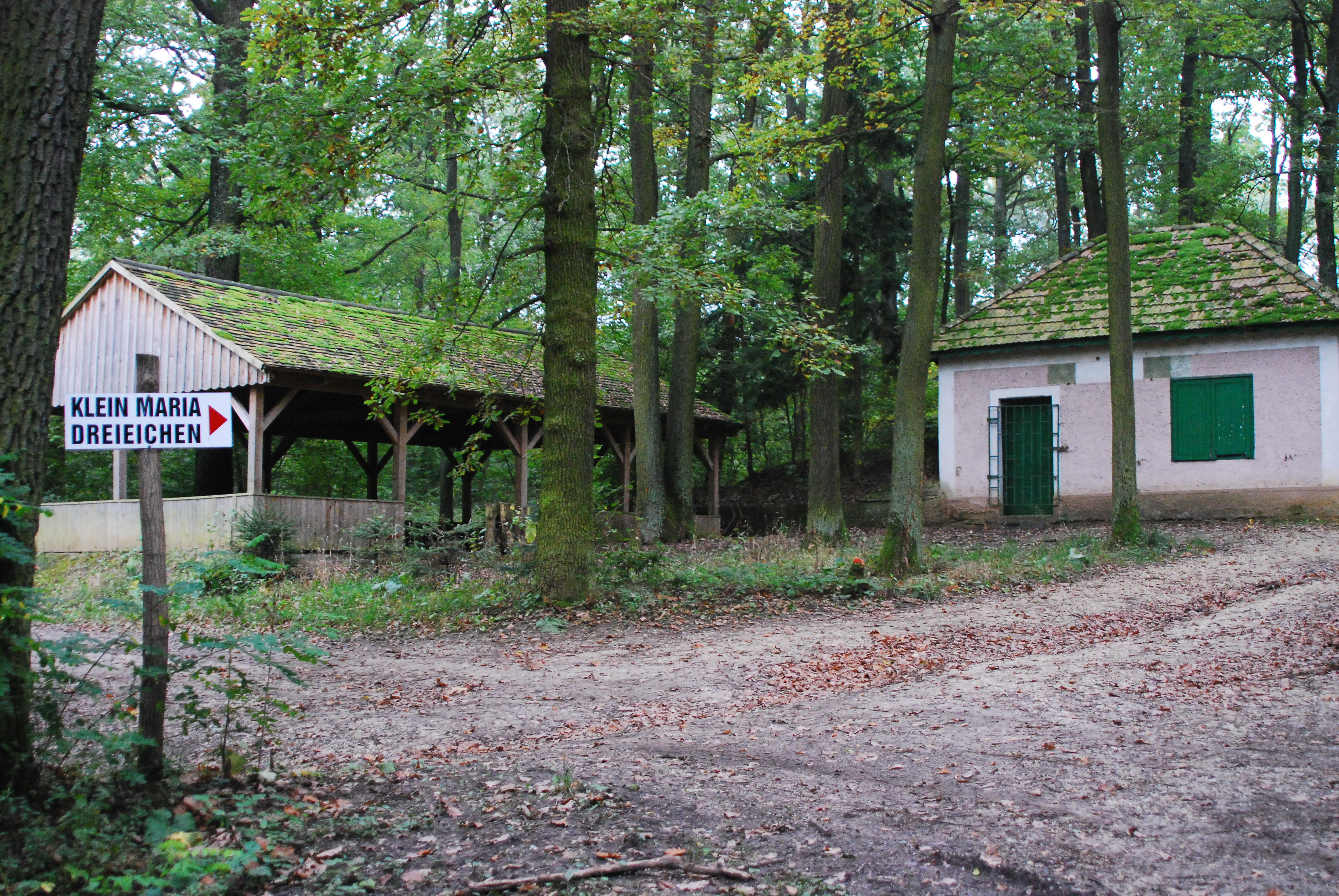 Klein-Maria-Dreieichen bei Groß in Niederösterreich